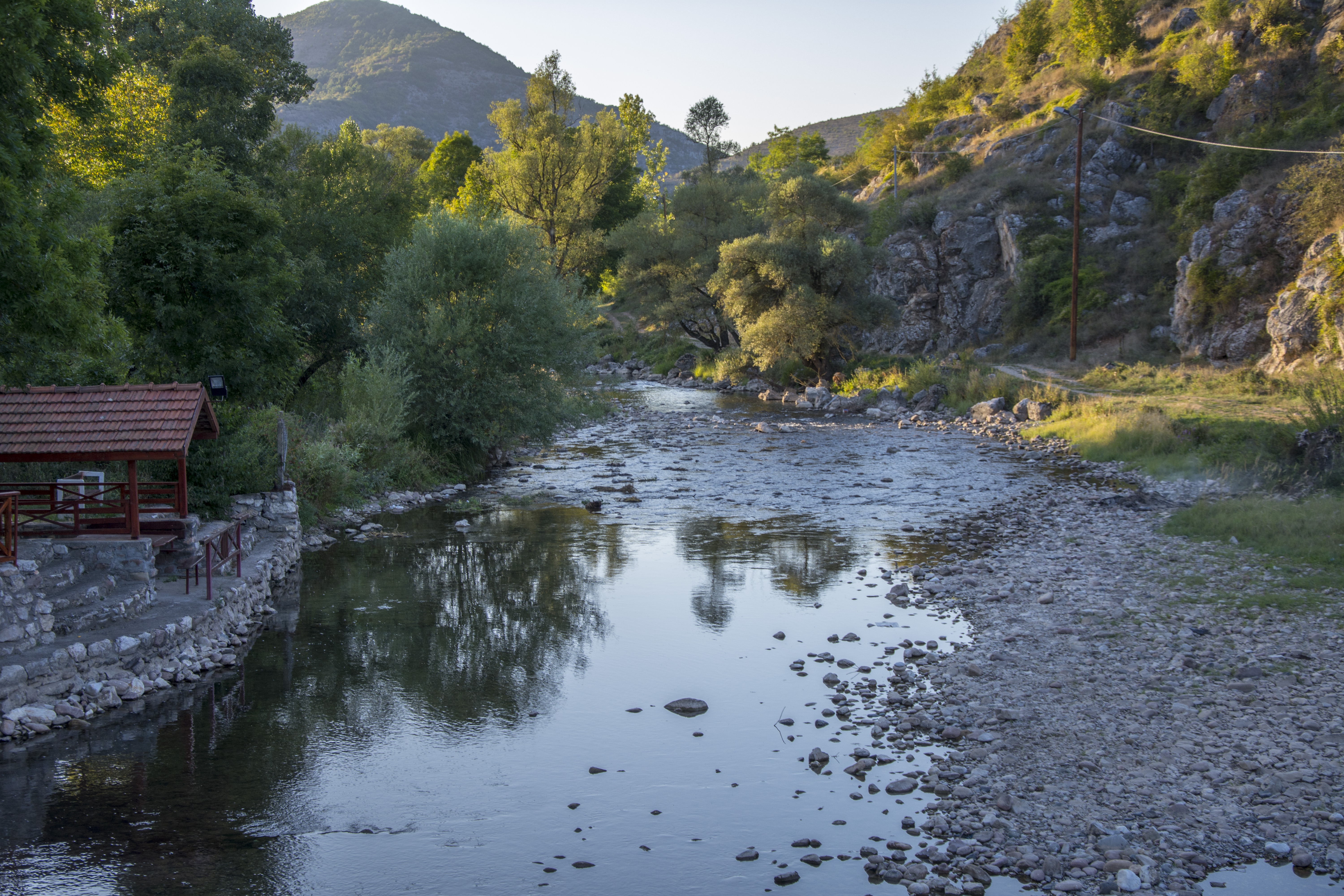 Височица, Рсовци